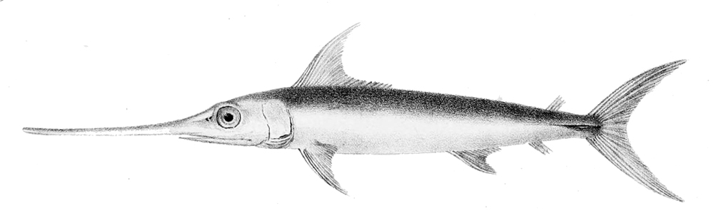 Xiphias gladius